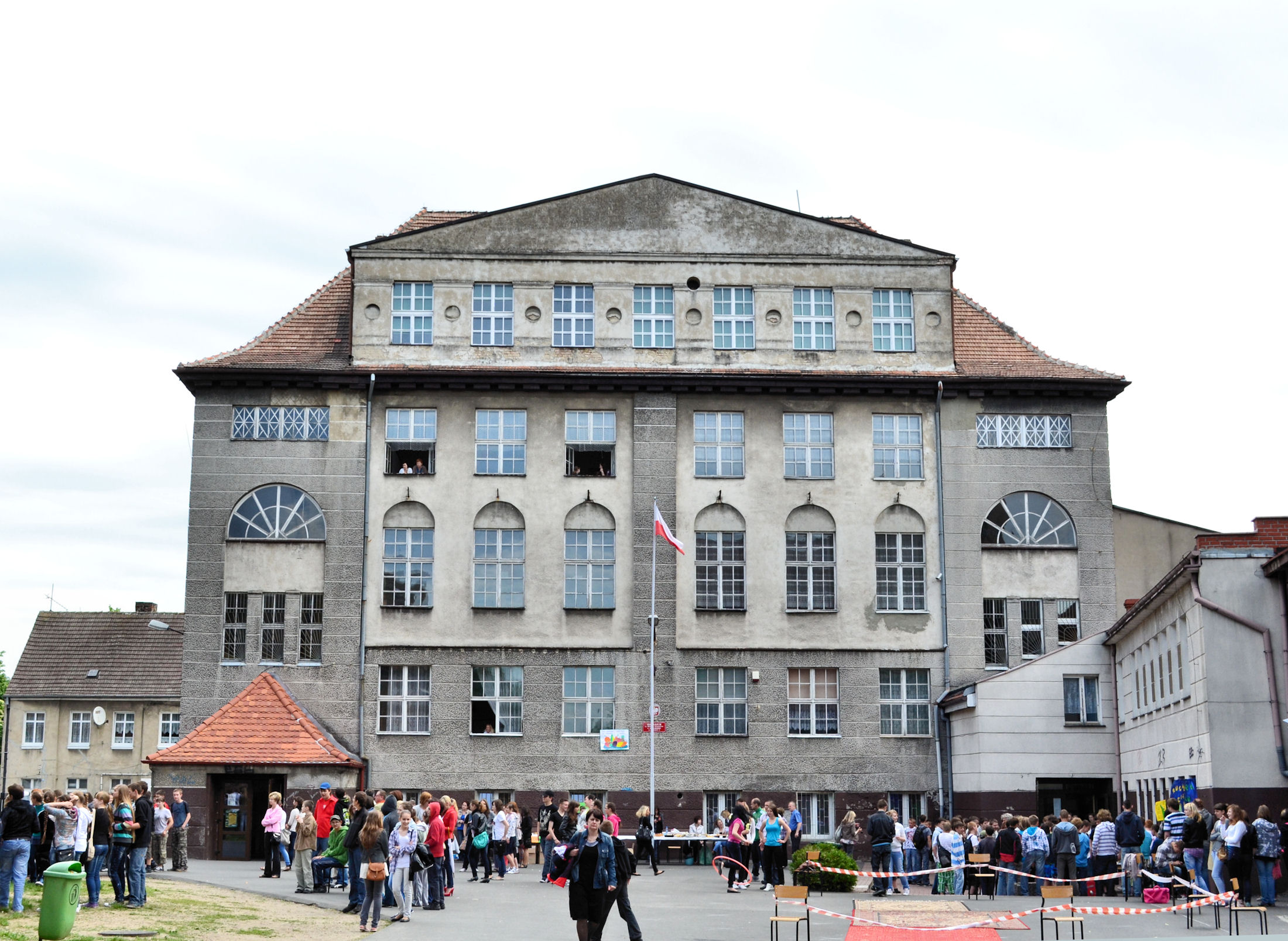 Gmach gimnazjum w Myśliborzu